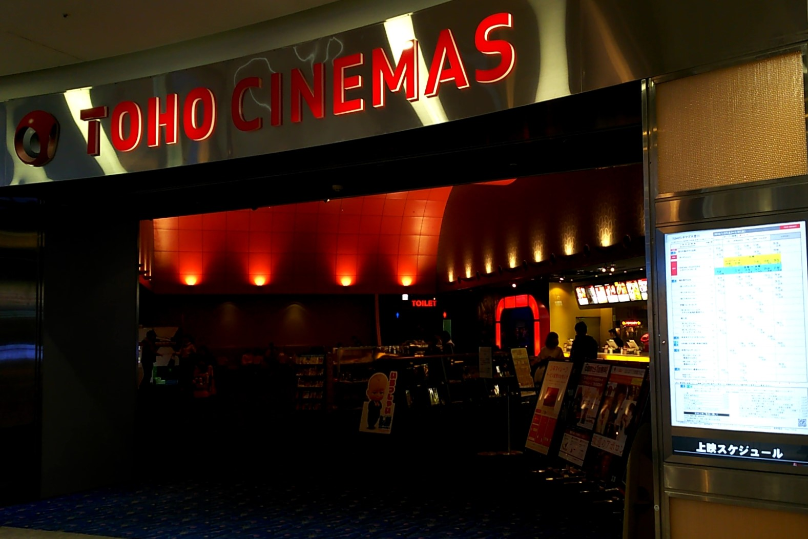 TOHOシネマズ木曽川。